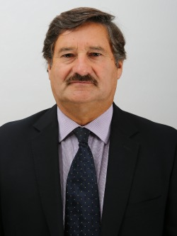 Ramón Farías, político chileno.